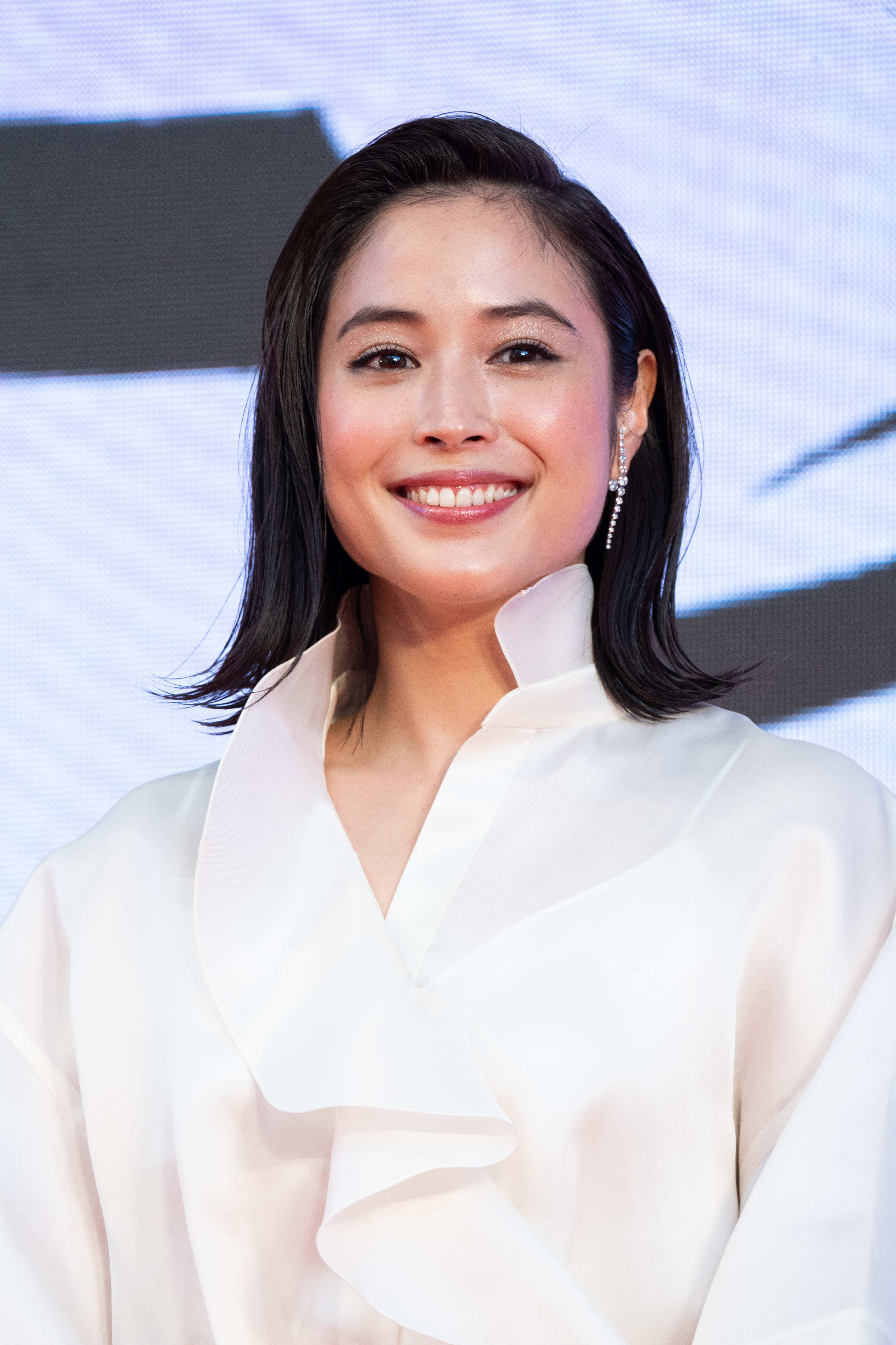 第32回 東京国際映画祭 オープニングセレモニー 広瀬アリス